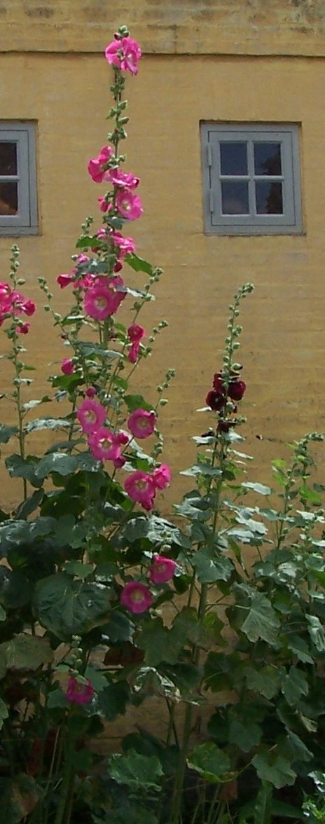 Stokrose